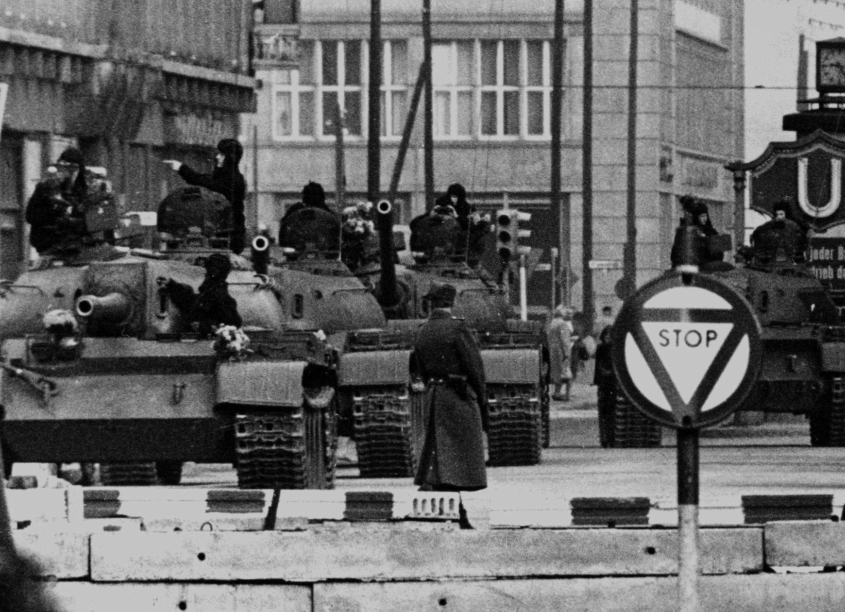 Carri sovietici T-55 schierati davanti al Checkpoint Charlie il 28 ottobre 1961, fronteggiano i mezzi corazzati americani